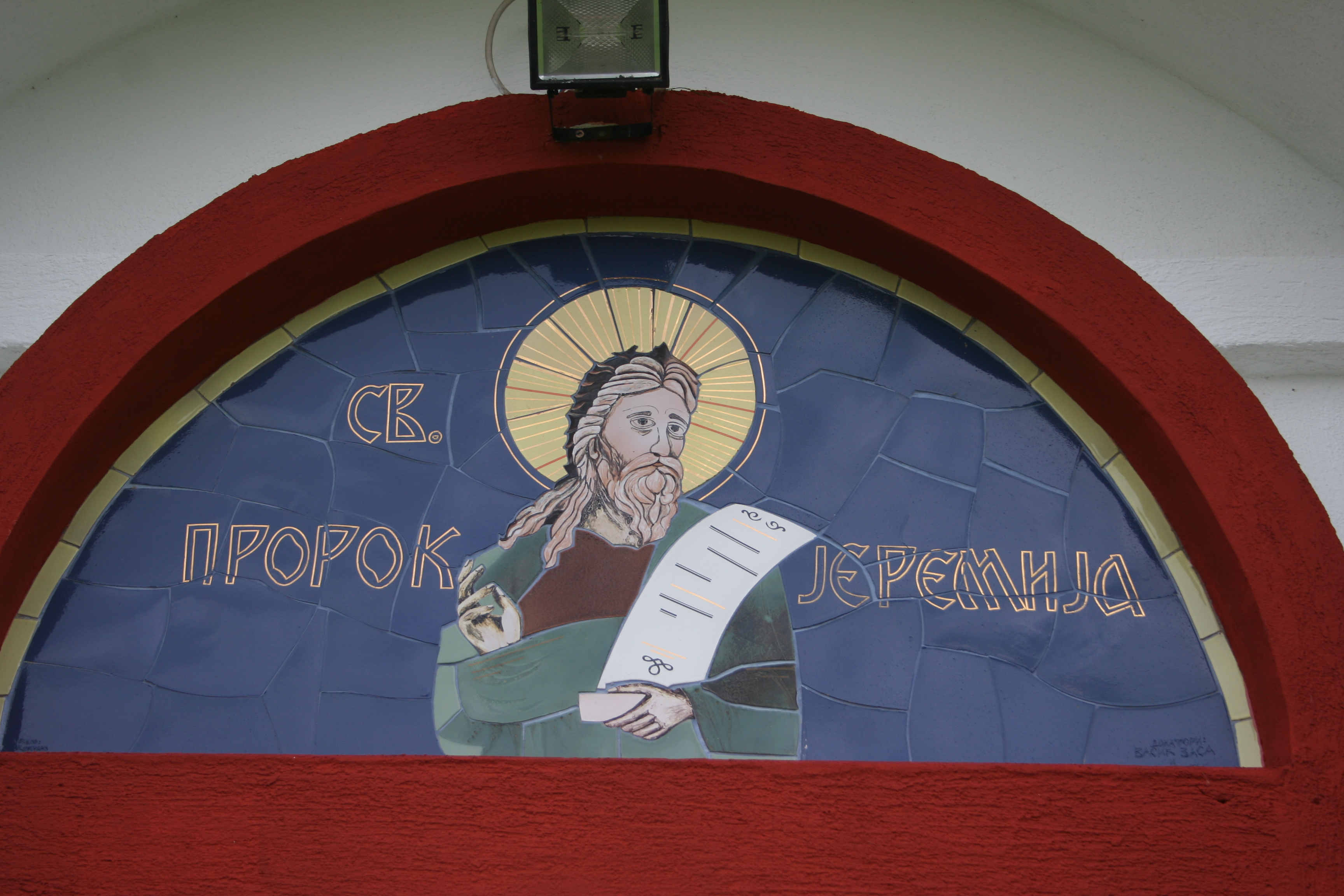 Crkva Sv. proroka Jeremije, Vrhpolje